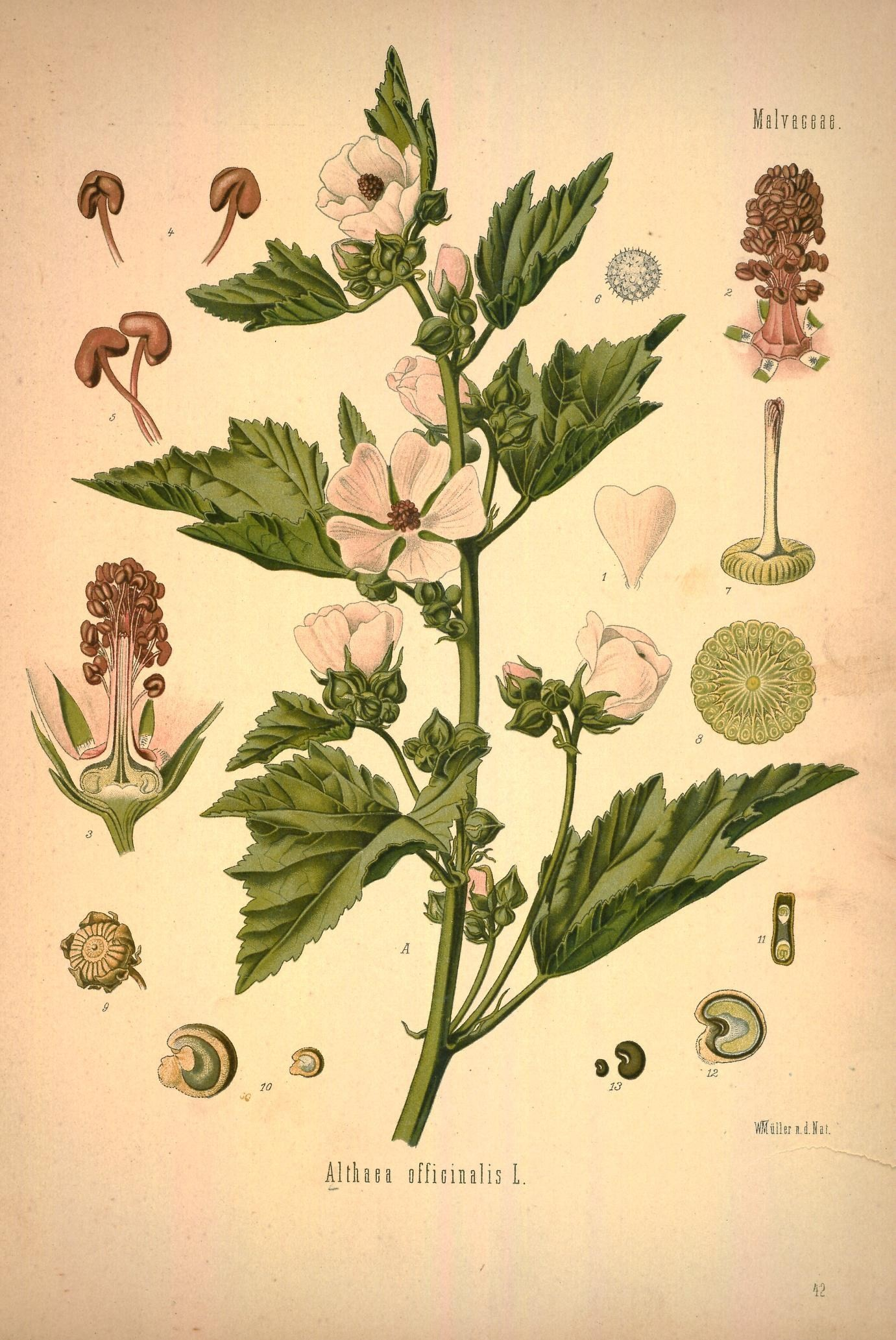 Echter Eibisch. A Pflanze in natürl. Grösse; 1 Kronblatt, desgl.; 2 Staubfadenröhre mit den Ansätzen der Kronblätter vergrössert;3 Blüthe im Längsschnitt, desgl.; 4 u. 5 Staubgefässe, desgl.; 6 Pollen, desgl.; 7 Stempel, desgl. ; 8 Fruchtknoten im Querschnitt, desgl.; 9 Frucht, natürl. Grösse; 10 einzelnes Früchtchen, natürl. Grösse und vergrössert; 11 u. 12 dasselbe in verschiedenen Längsschnitten, desgl.; 13 Same, natürl. Grösse und vergrössert.